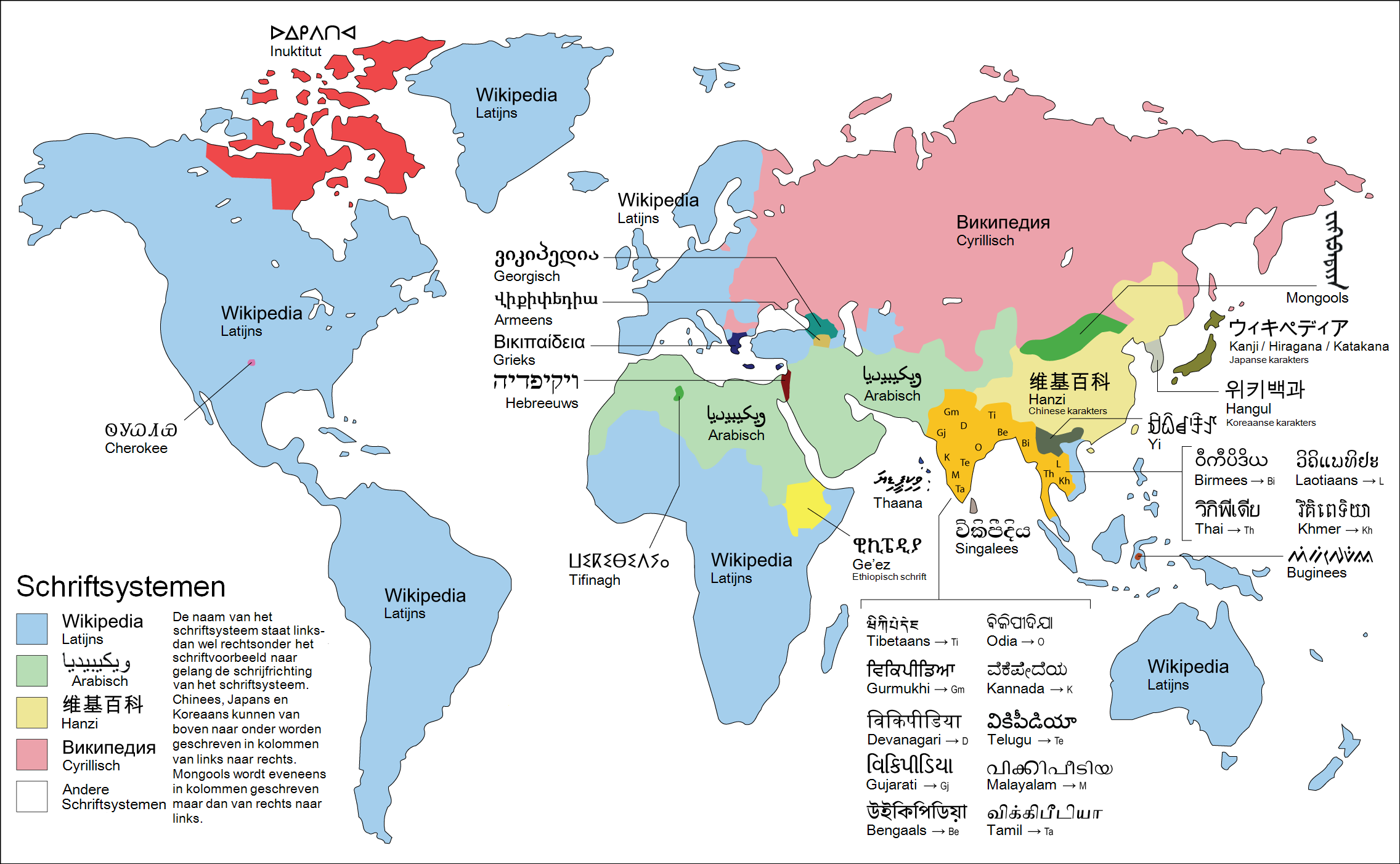 Infografischoverzicht van de meest gebruikte schriftsystemen in de wereld. Dit overzicht is niet volledig, talloze Afrikaanse schriftsystemen ontbreken dit is mede doordat de documentatie van deze schriftsystemen niet optimaal is. Ook door plaatsgebrek zijn er keuzes gemaakt. Dit is een vertaalde versie van Chumwa originele Duitstalige versie.